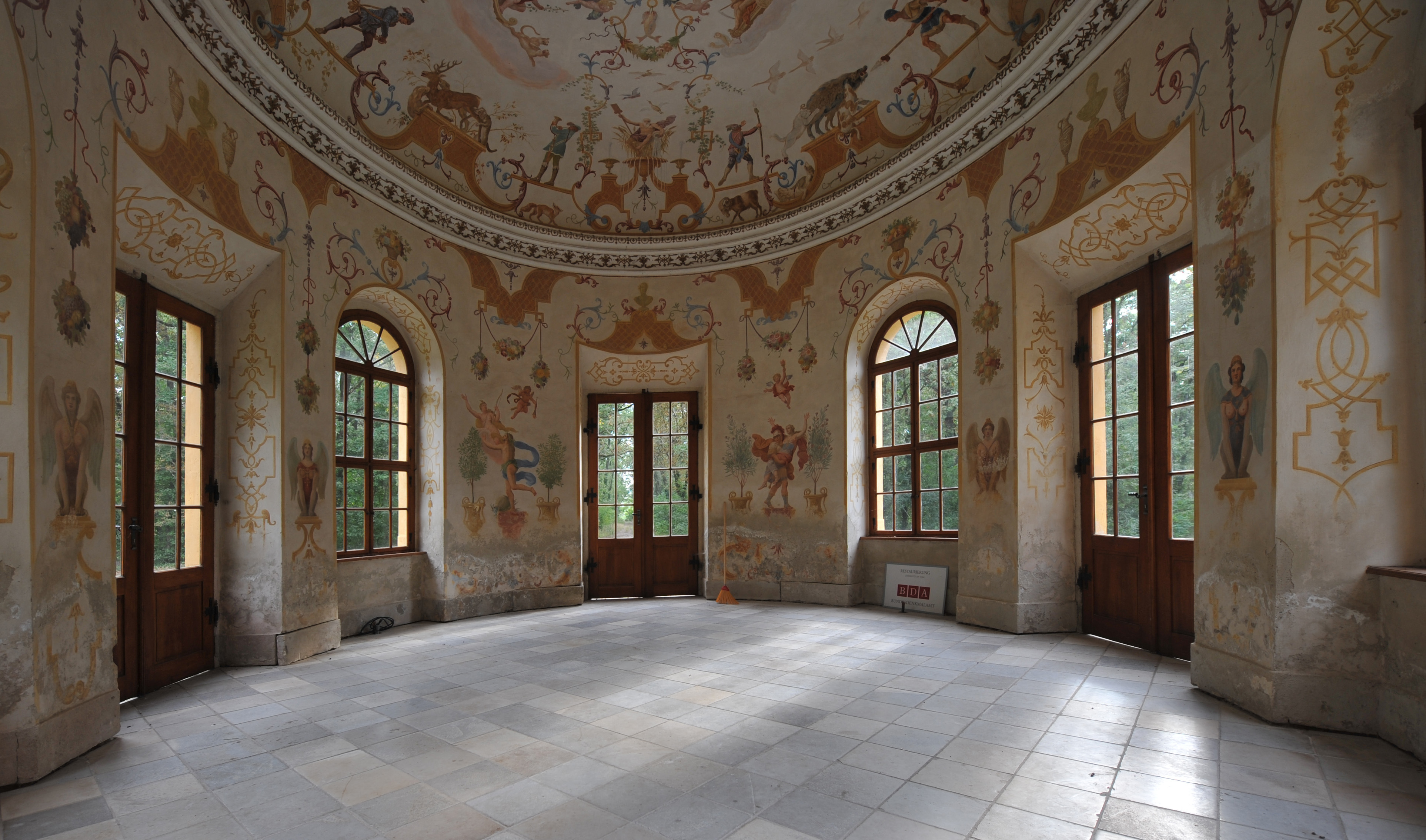 Gartenpavillon des Schlosses Obersiebenbrunn